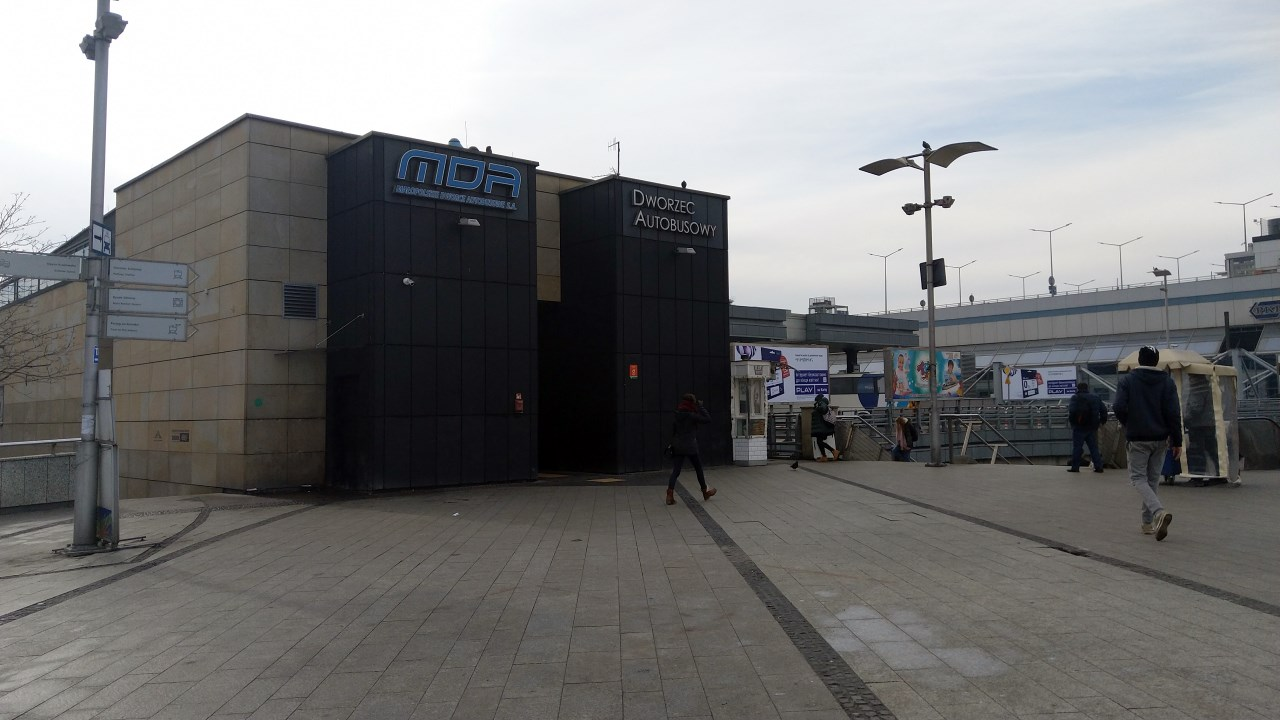 Fajny dworzec